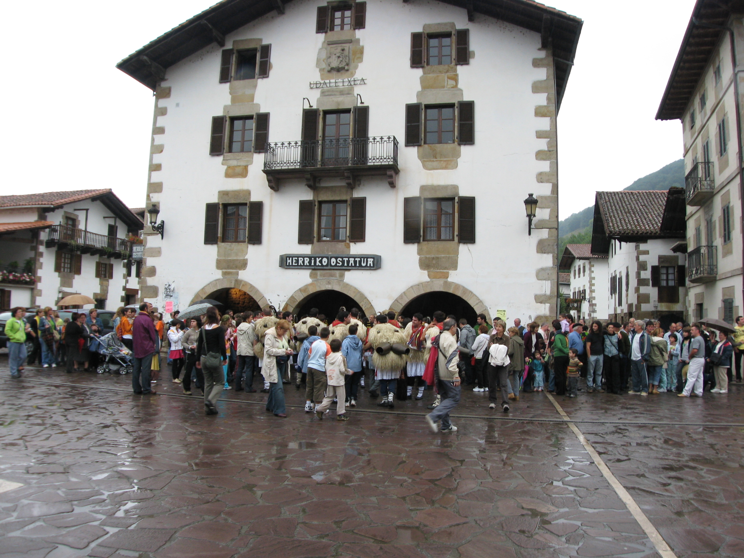 Mairie sur la place d'Ituren (Navarre) (Pyrénées).